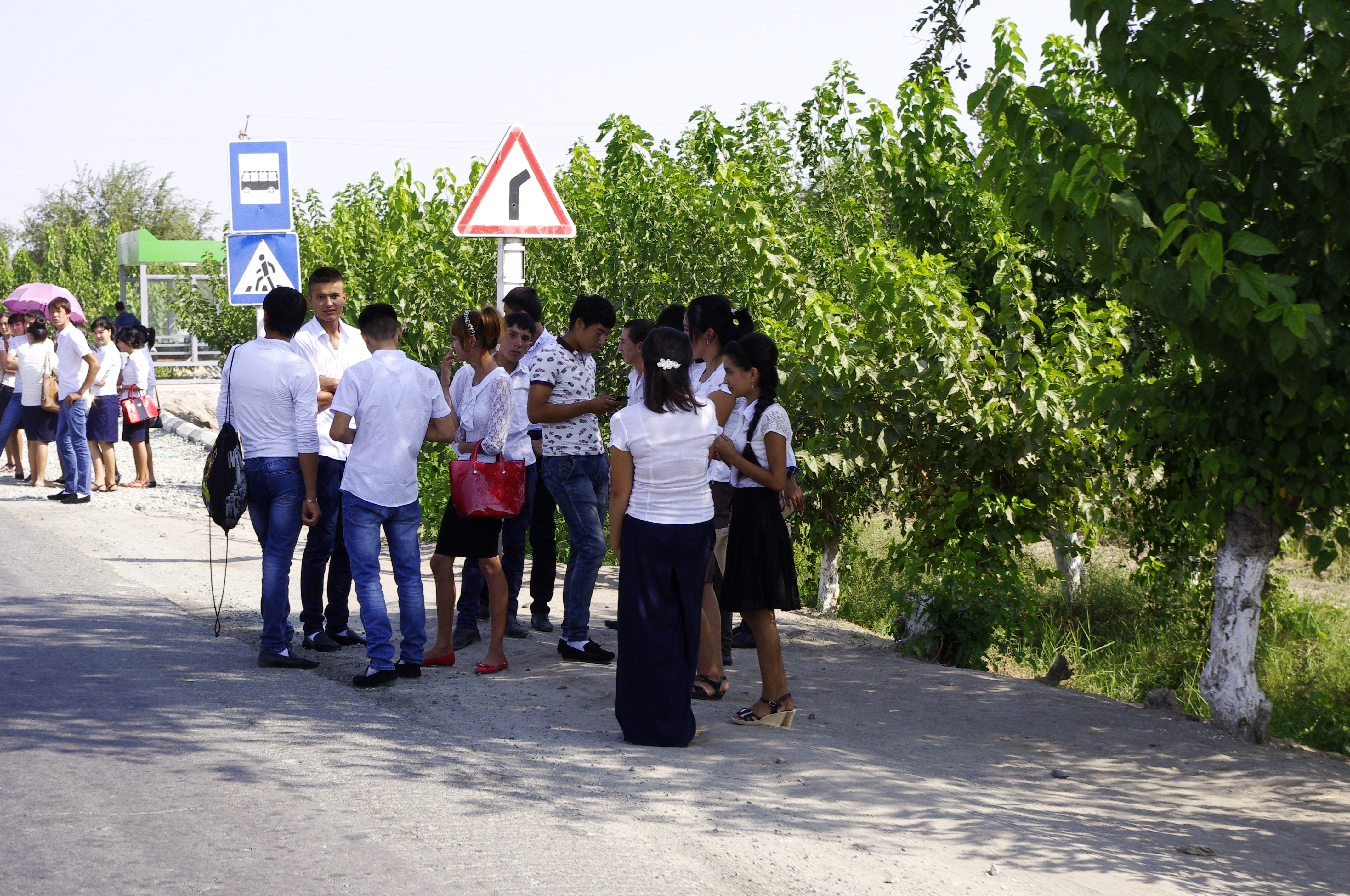 The making of this document was supported by Wikimedia Polska. To zdjęcie zostało wykonane podczas Wikiwyprawy 2015.Wszystkie zdjęcia z wyprawy możesz zobaczyć w kategorii: Wikiwyprawa 2015. English | polski | +/− To zdjęcie zostało załadowane dzięki współpracy z firmą Hyperbook. polski | +/− To zdjęcie zostało załadowane dzięki współpracy z firmą: Kopex Group. English | polski | +/−